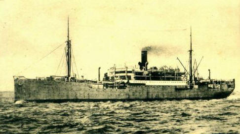 Der Dampfer BAHIA CASTILLO der Hamburg Süd